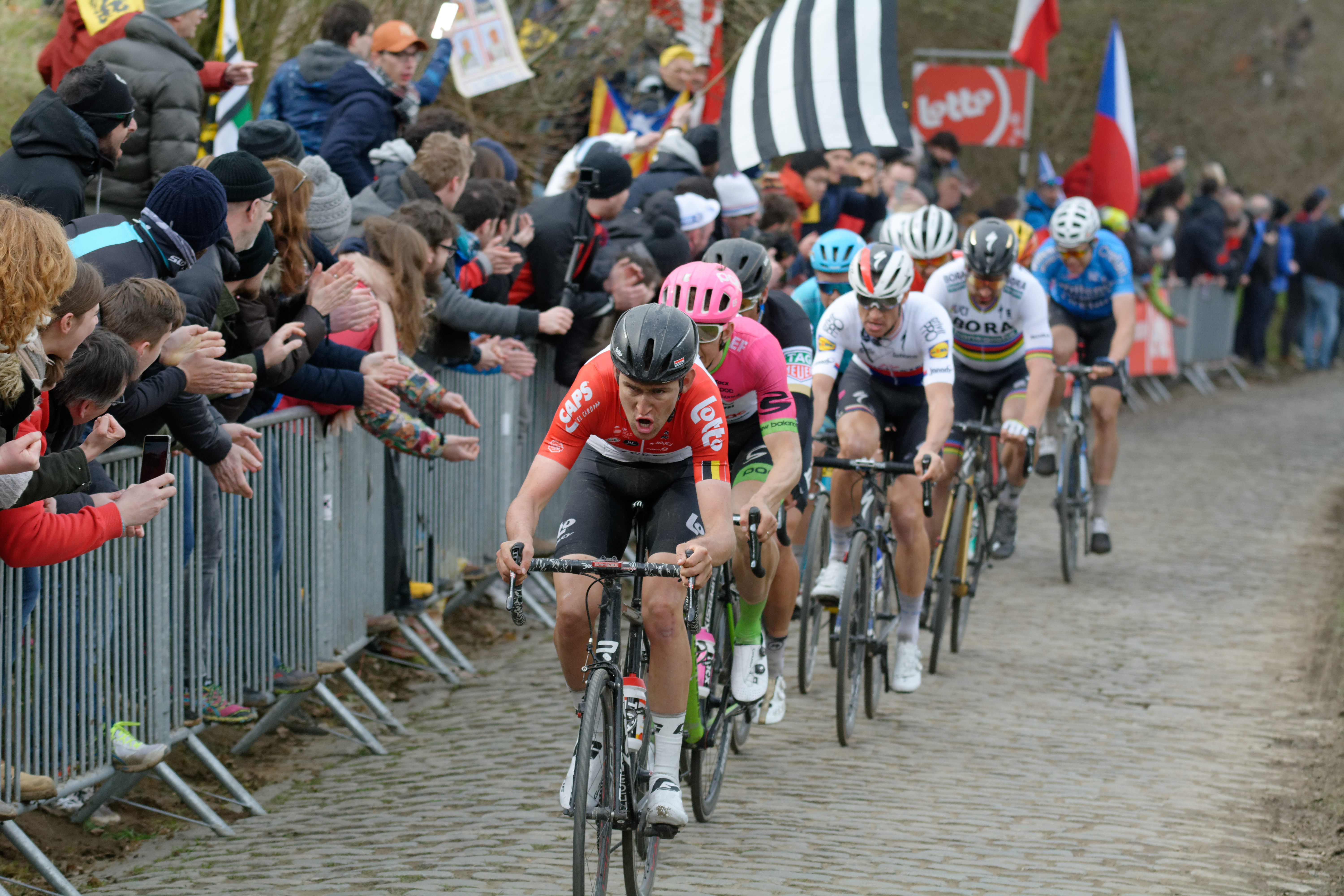 Ronde Van Vlaanderen 2018 / Tour of Flanders 2018 Oude Kwaremont